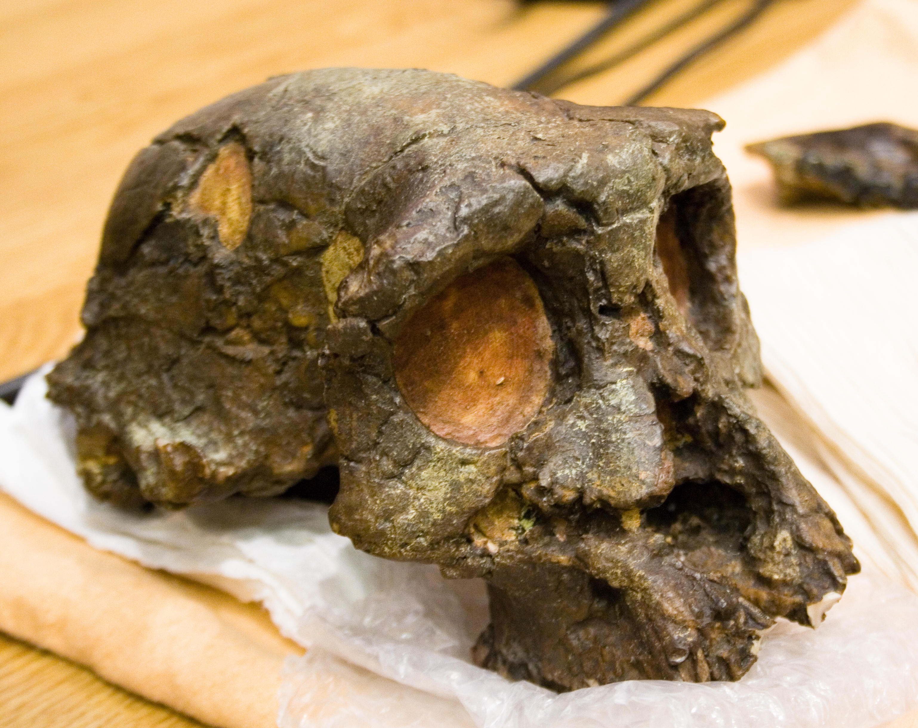 Moulage du crâne de Toumaï lors d'une conférence de Michel Brunet le 10 septembre 2008 à l'université de Fribourg en Suisse